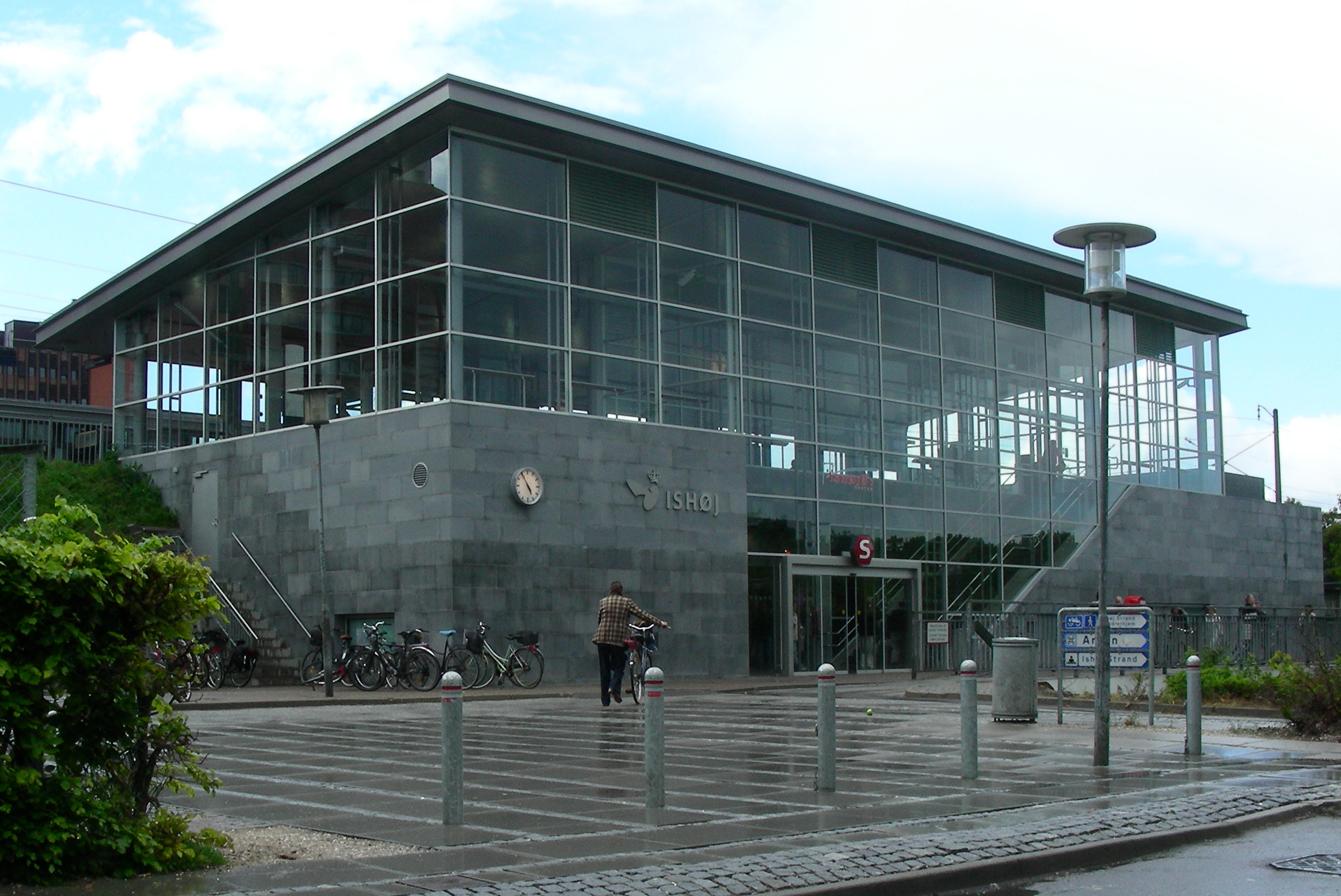 Ishøj S-Train Station, Denmark.